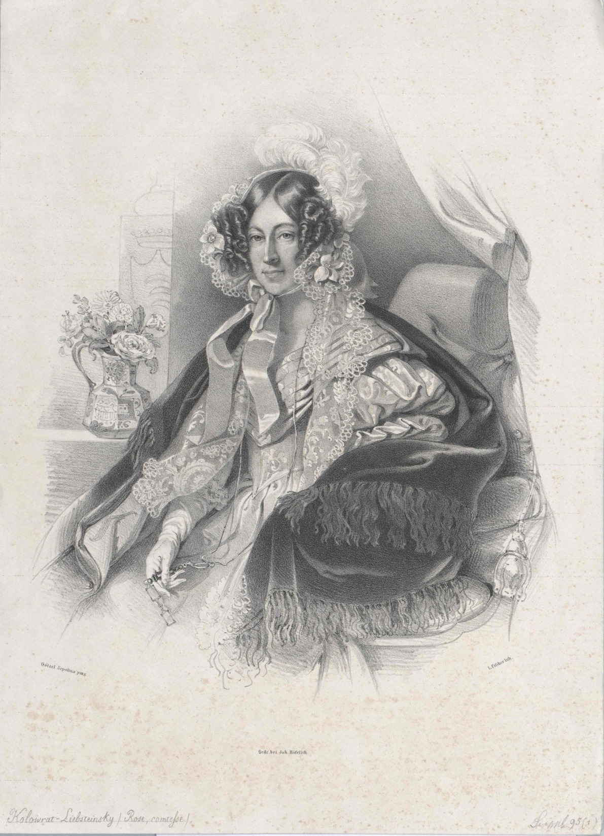 Marie Rosa Kolowrat-Liebsteinská, rozená Kinská z Vchynic a Tetova (1780 - 1842)